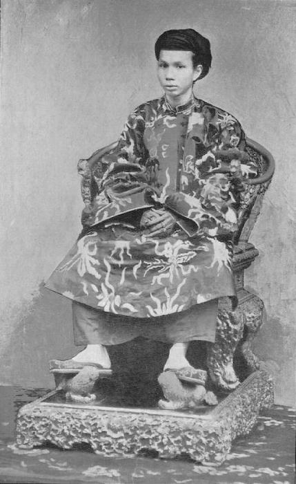 Emperor Đồng Khánh of Vietnam.